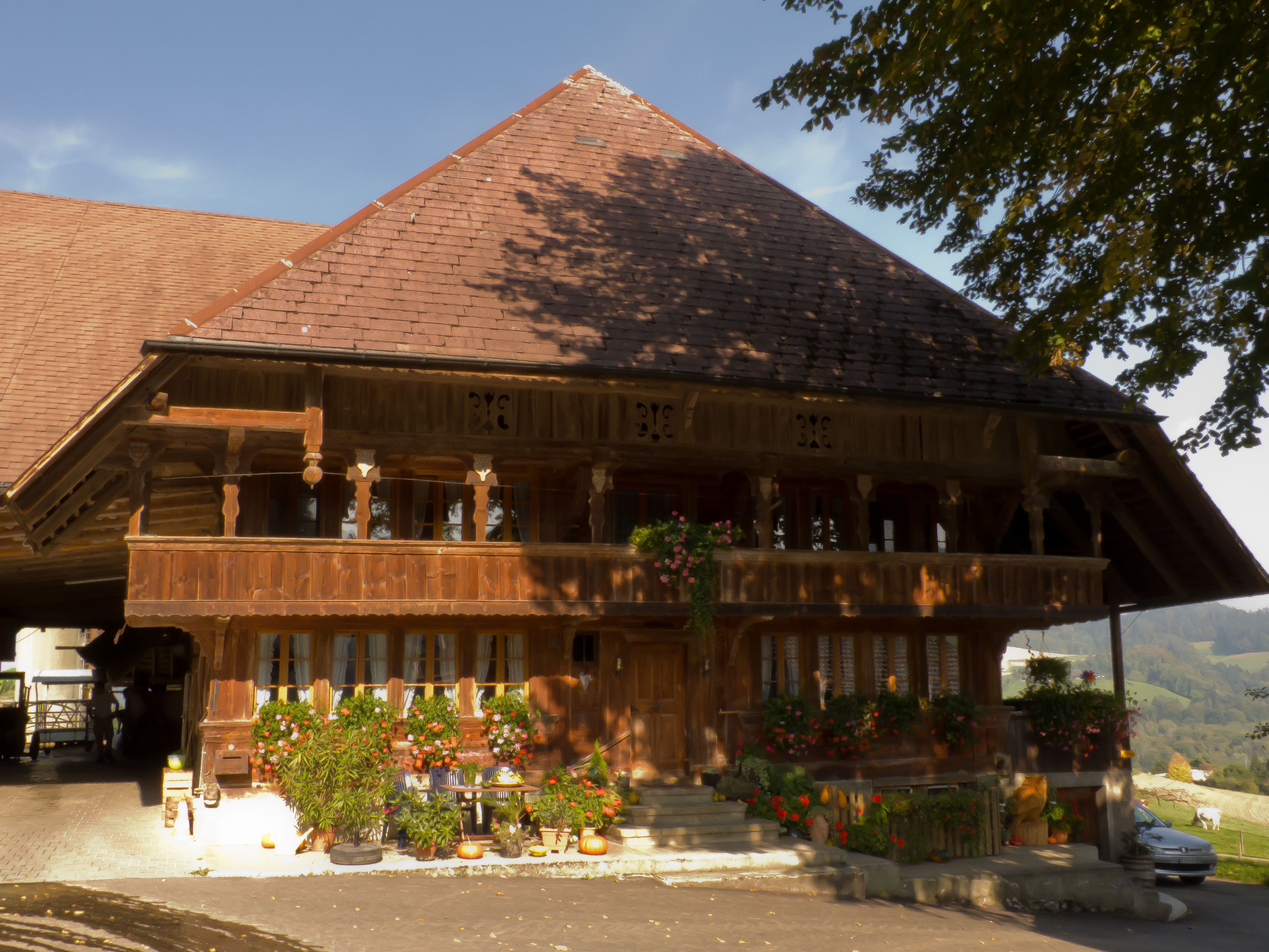 Oberburg, Staldenhof, erbaut 1776 in aufwändiger Zimmermannskunst.